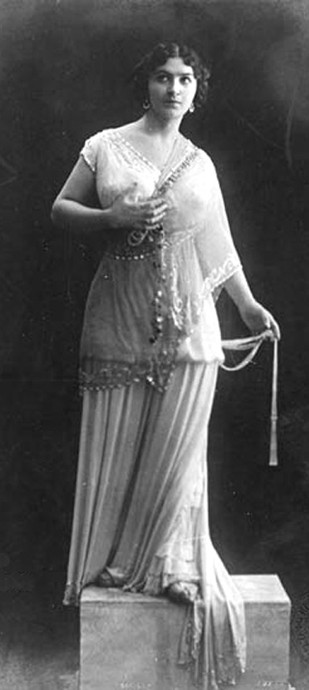 Maria Nikolaevna Kuznetsova in Jules Massenet's Thaïs